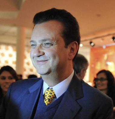 Gilberto Kassab em visita à Bienal de moda de São Paulo em 2011